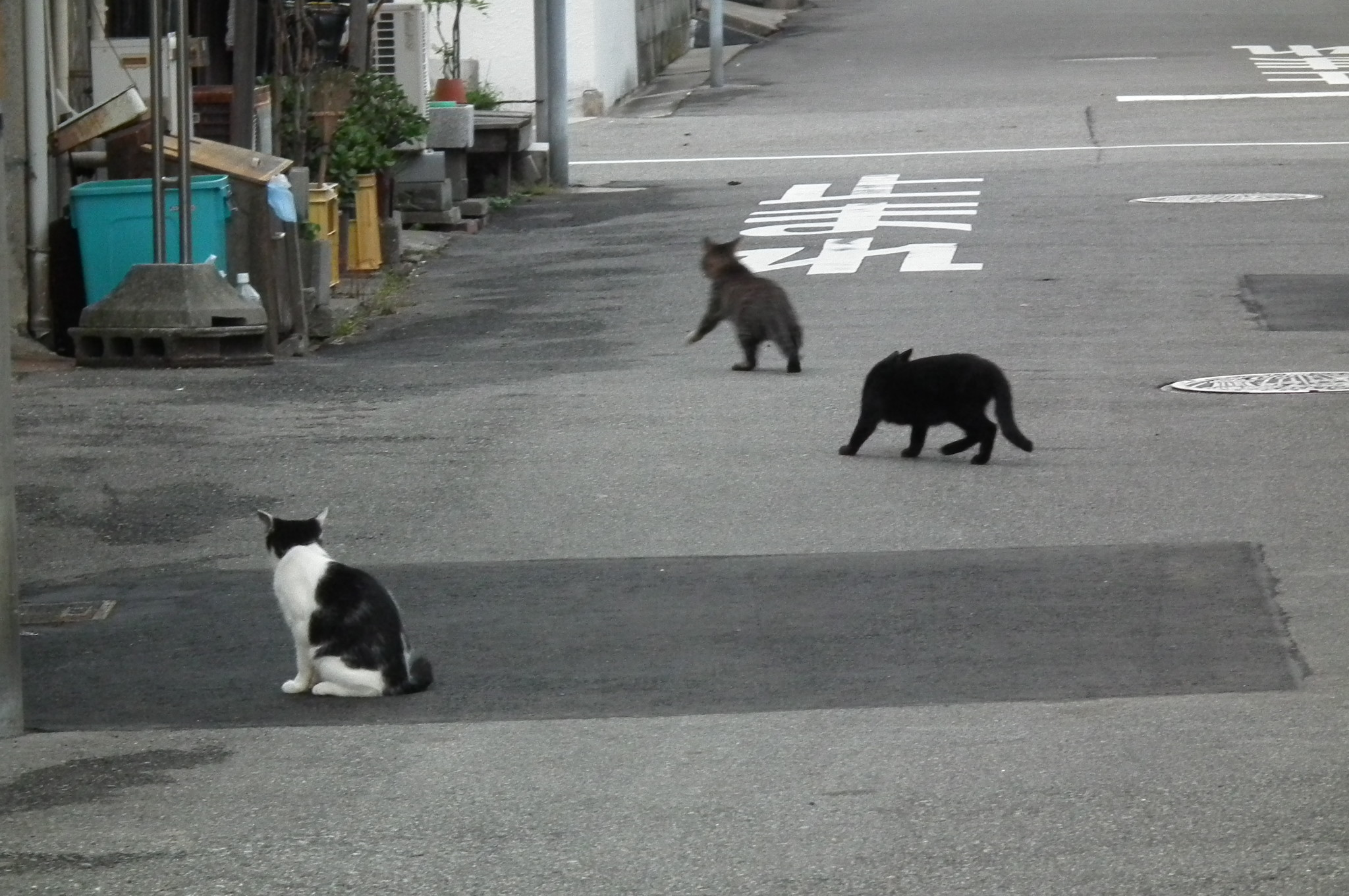 Cats of Port of Akashi,明石港 明石市岬町